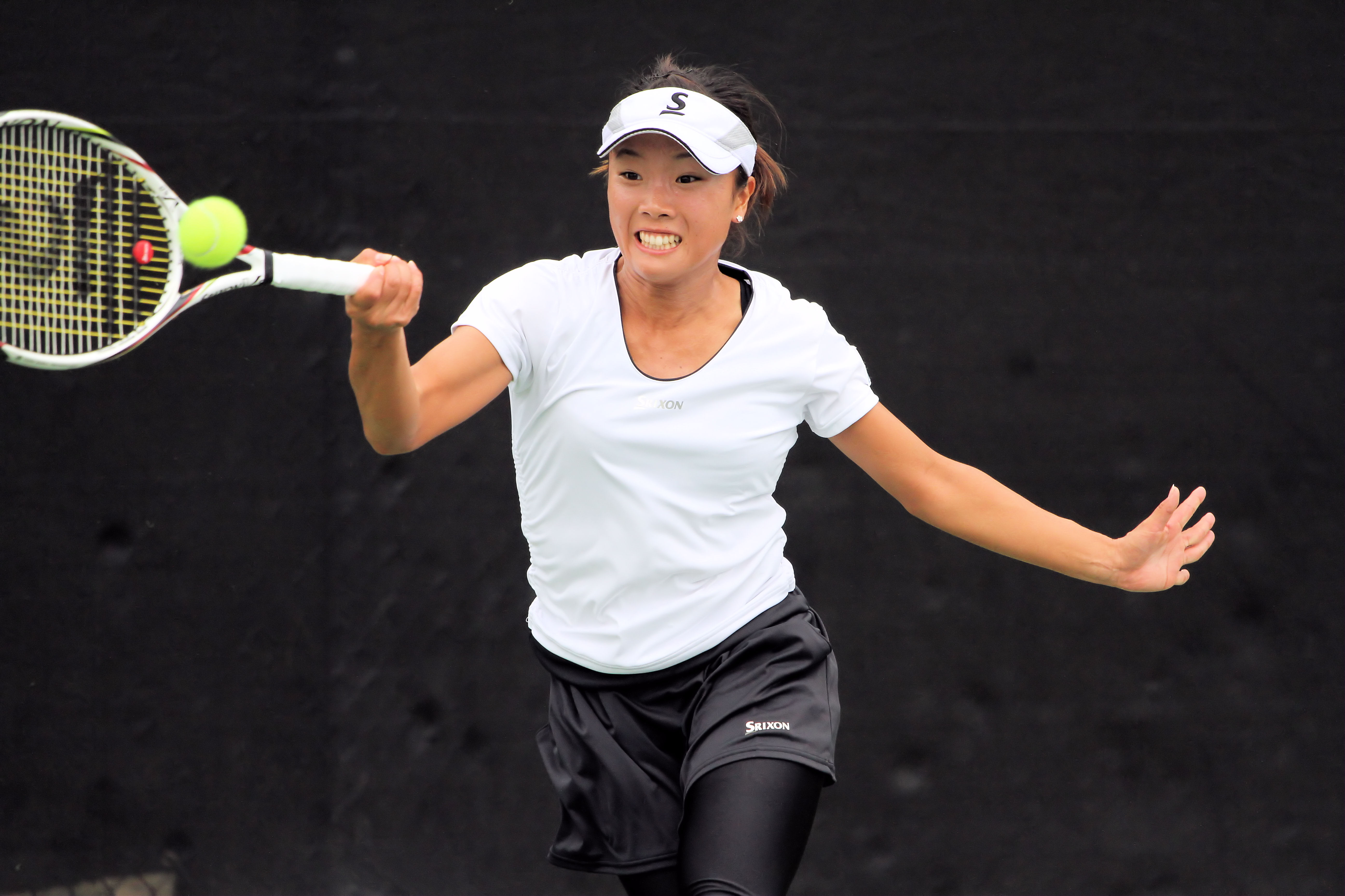 Kurumi Nara (JPN) [8]